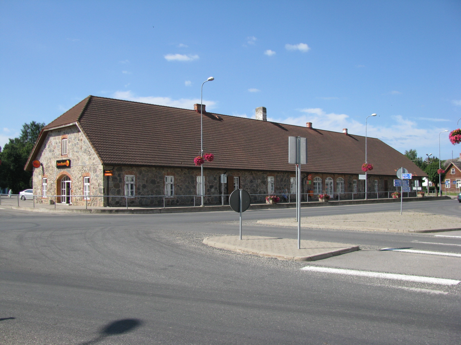 Valga tn 1